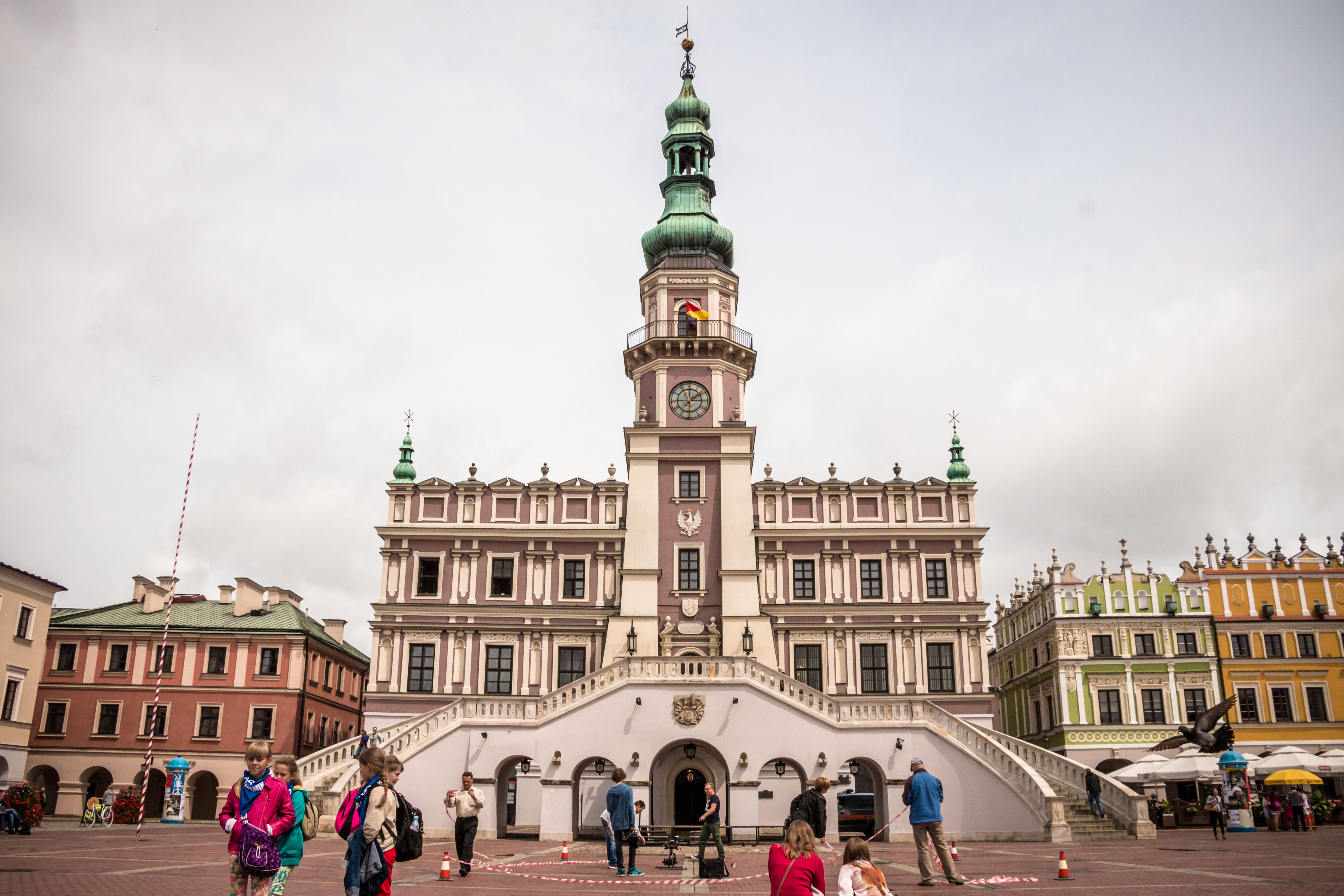 Zamość, Ratusz z oficynami (k. XVI w., XVII-XIX w.)